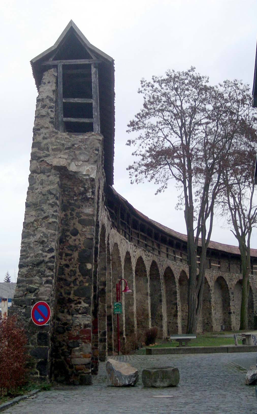 Schwibbögen der Stadtmauer in Butzbach/Hessen.